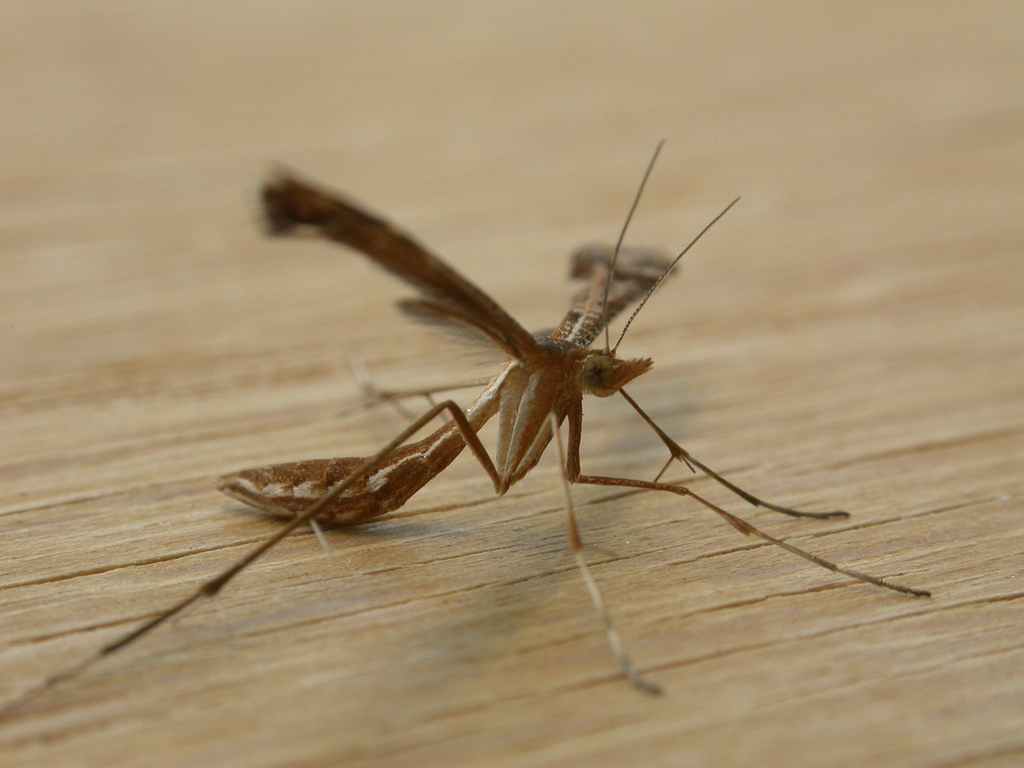 Sinpunctiptilia emissalis